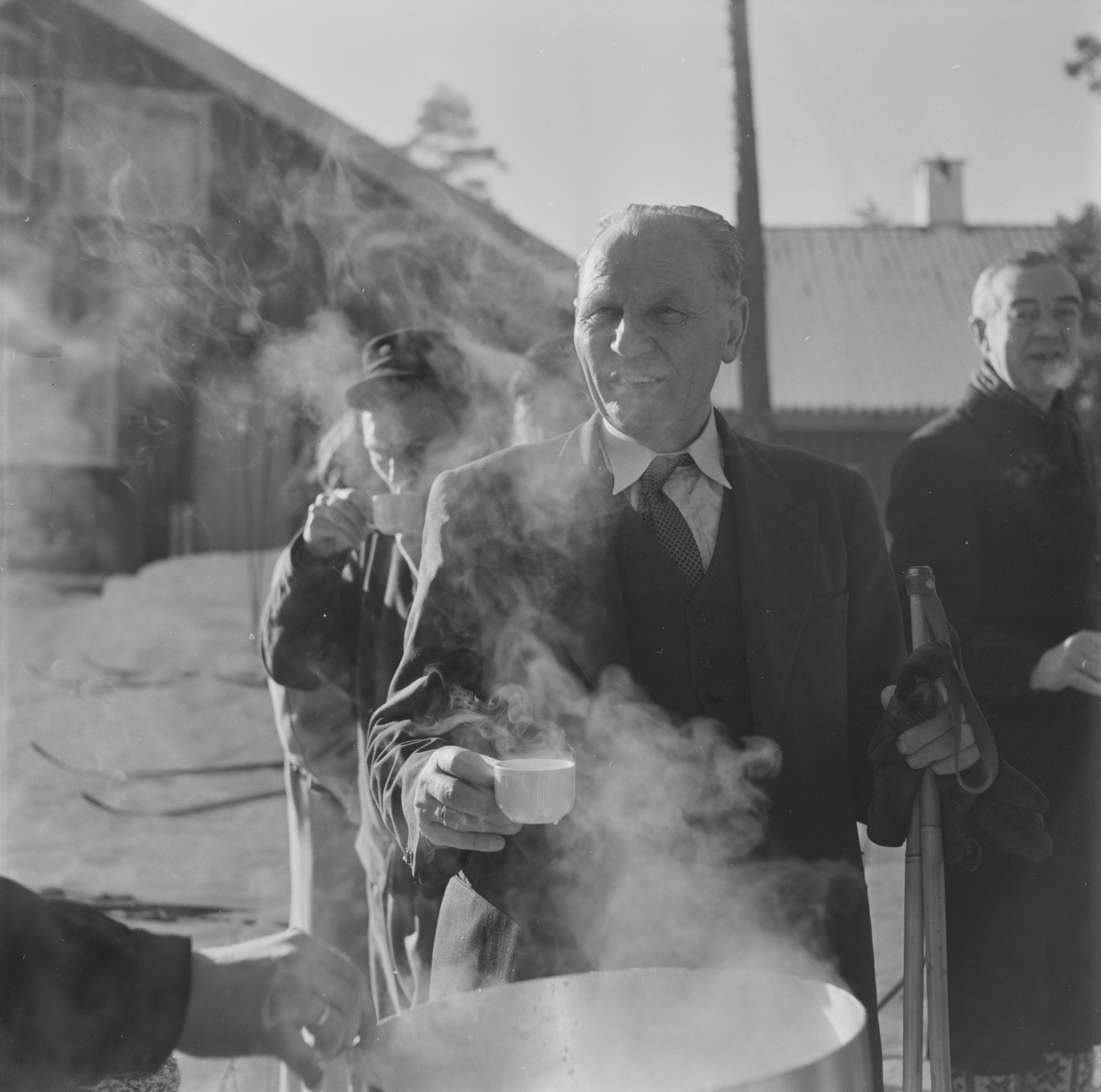 Bildet er hentet fra Arkivverket. Stortinget på ski NÅ nr. 9, 1955 Arkivinstitusjon : Riksarkivet Arkivnavn : Billedbladet NÅ Sted : Norge, Ukjent, Ukjent, Ukjent Emneord: Ski, Menn, Vinter, Snø Avbildet: Olav Aslakson Versto